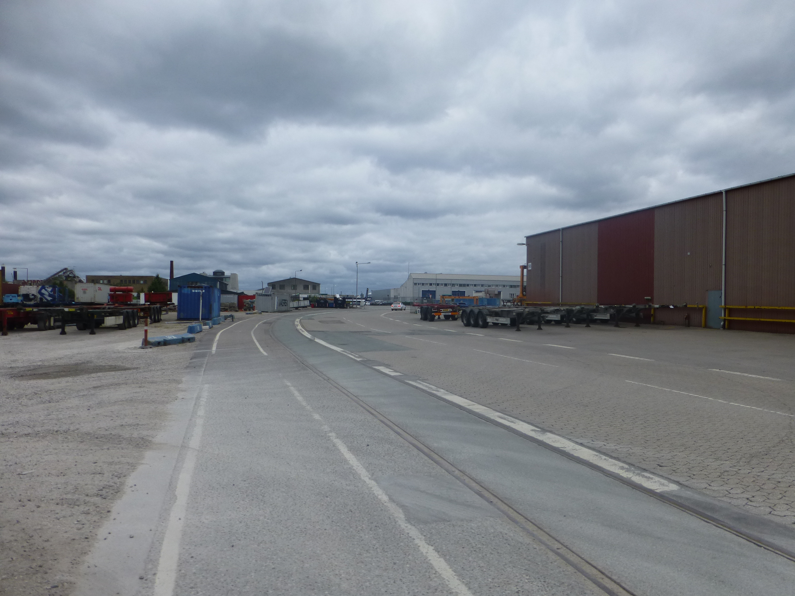 The street Industrivej in Nordhavn in Copenhagen.